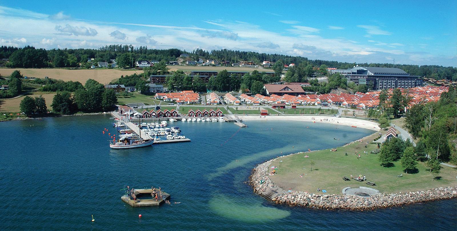 Oslofjord Convention Center AS by Dyrvik Arkitekter